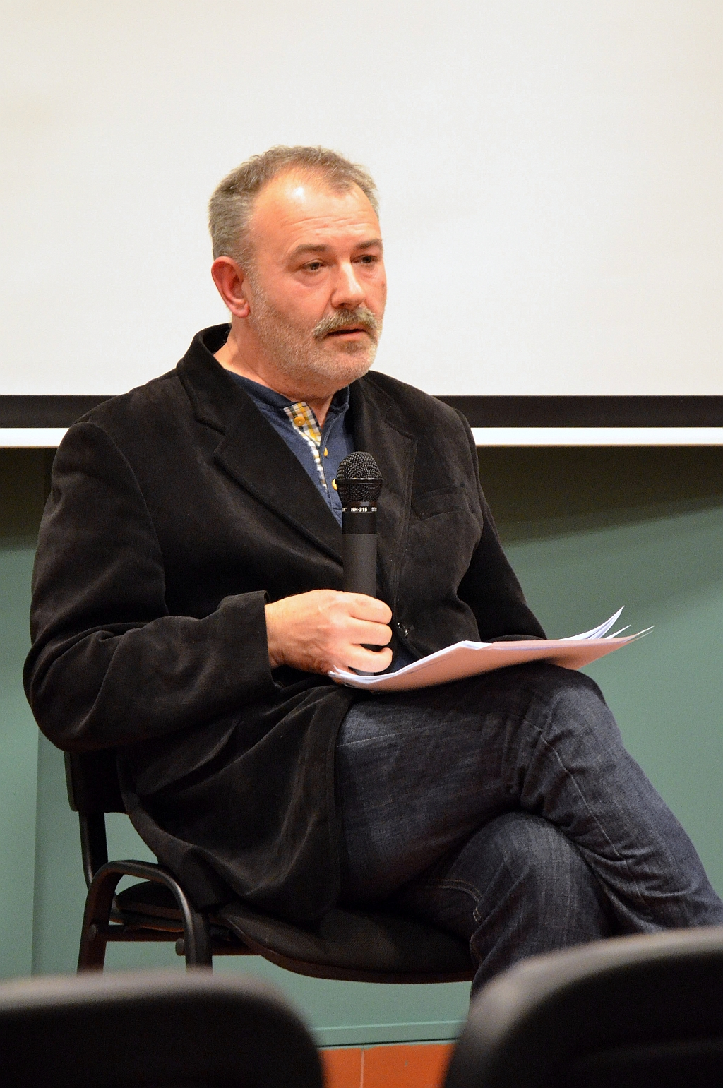 Profesor Zbigniew Libera, etnolog i antropolog.